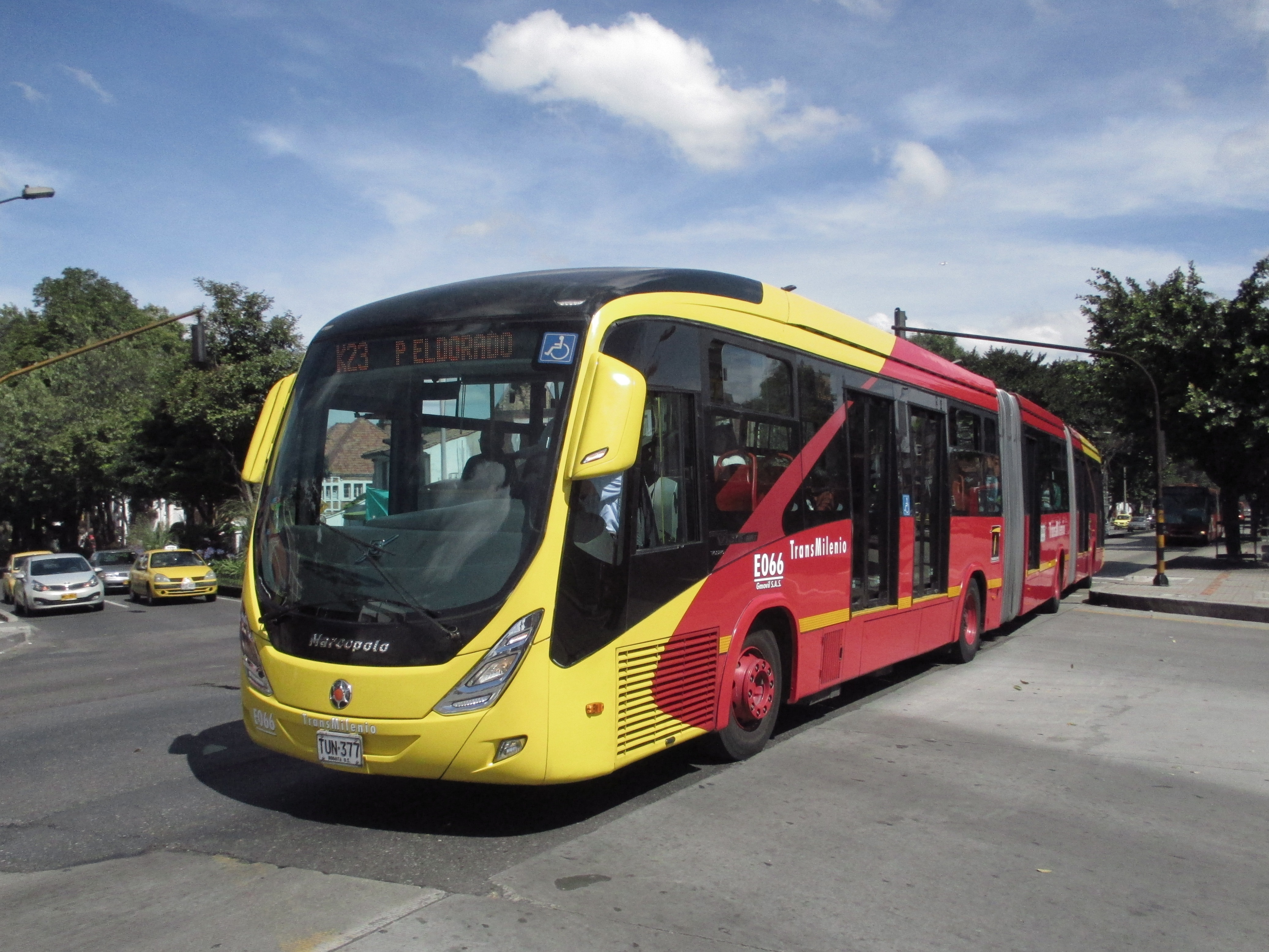 Bus de Transmilenio